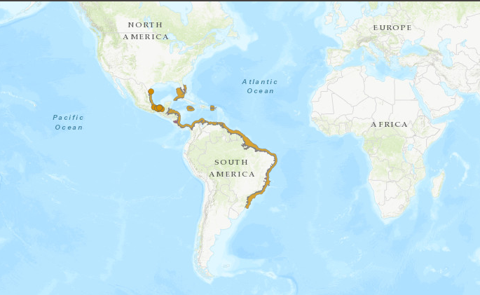 Distribuição do Peva